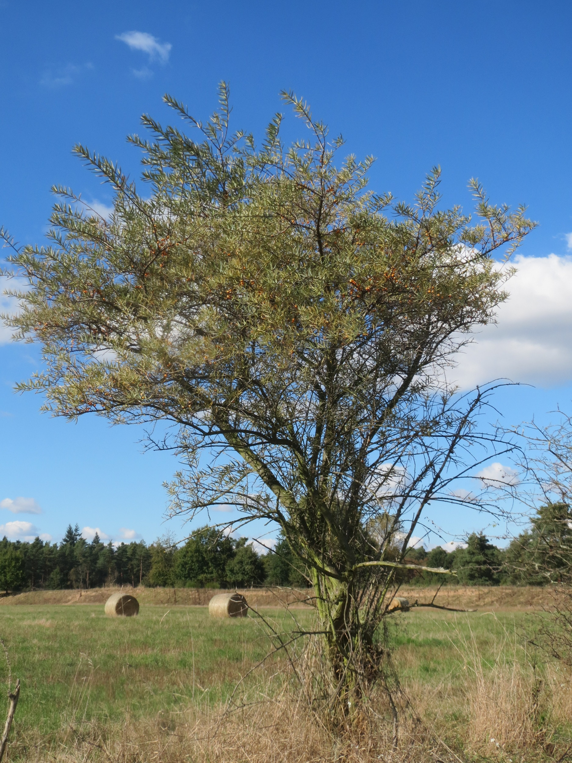 Sanddorn (Hippophae rhamnoides) im Naturschutzgebiet Gewann Frankreich-Wiesental - der Sanddorn kommt wild wachsend nicht nur an der Küste vor sondern zerstreut auch auf den Sandflächen im Oberrheingraben